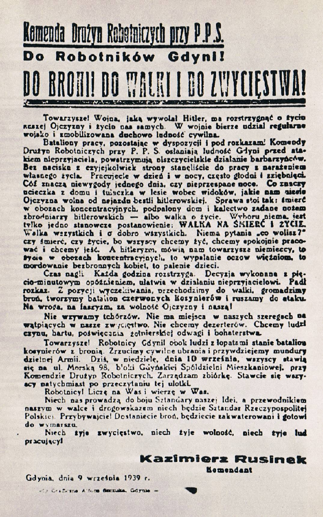 Afisz informujący o tworzeniu Czerwonych Kosynierów z września 1939 r.